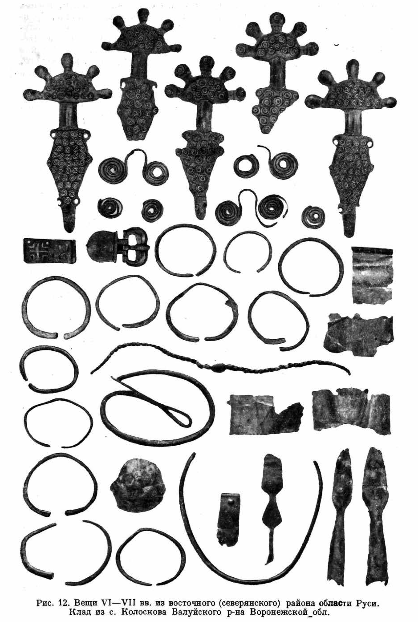 Колосковский клад. Государственный исторический музей К вооружению и одежде воина относятся два небольших железных втульчатых копья, серебряная пряжка со щитком геральдической формы и прорезная серебряная бляшка для ремня. Остальные вещи относятся к нескольким разрозненным женским наборам украшений. Имеется пять пальчатых фибул, щитки которых украшены циркульным орнаментом, много целых и поломанных бронзовых браслетов с характерными расширенными концами, часть гривны и другие вещи.